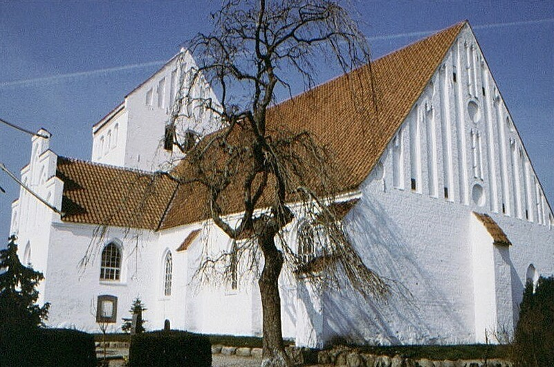 Kirke Helsinge Kirke i Danmark. Kirke Helsinge kirke